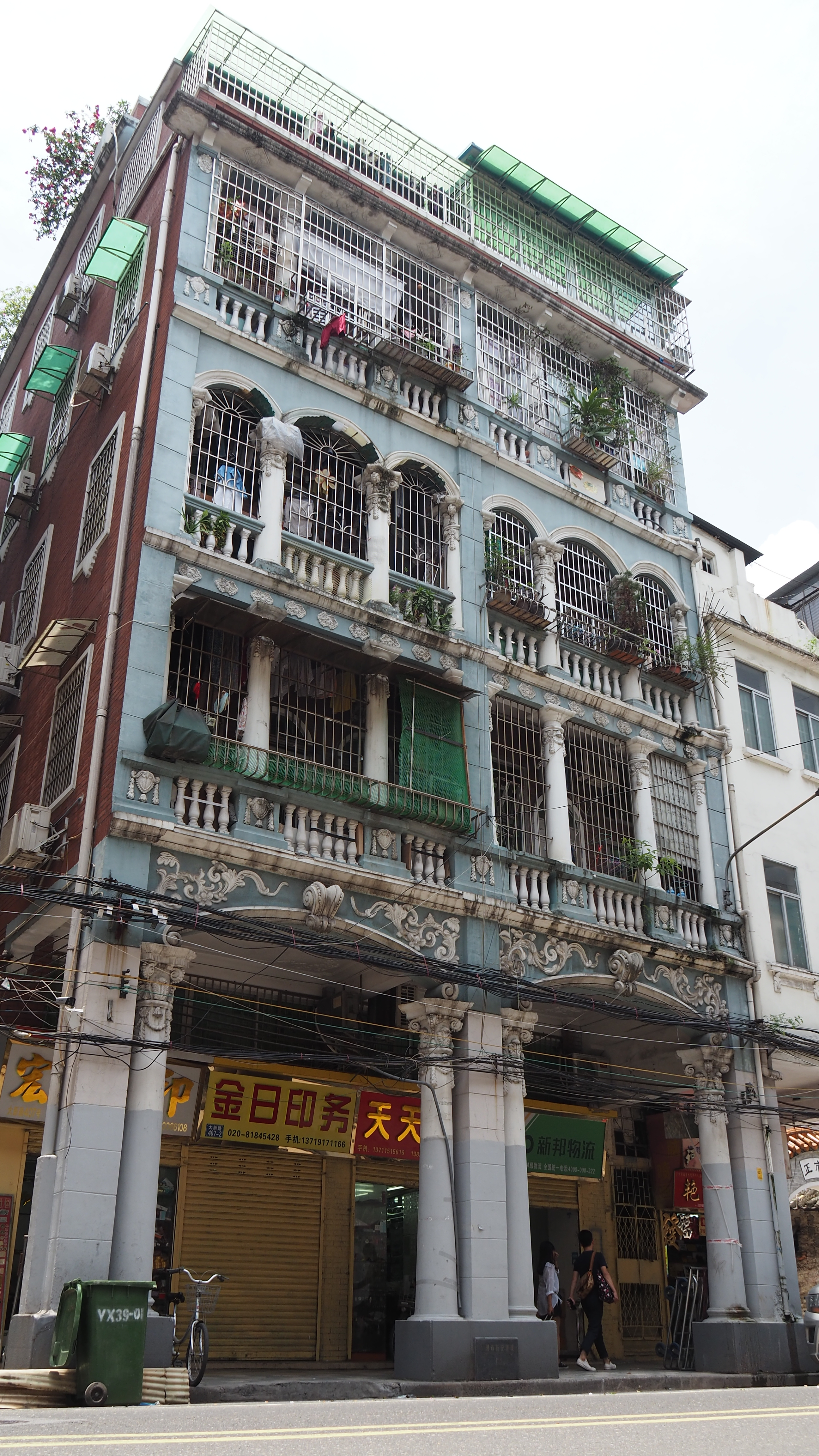 位于广州市越秀区大新路。